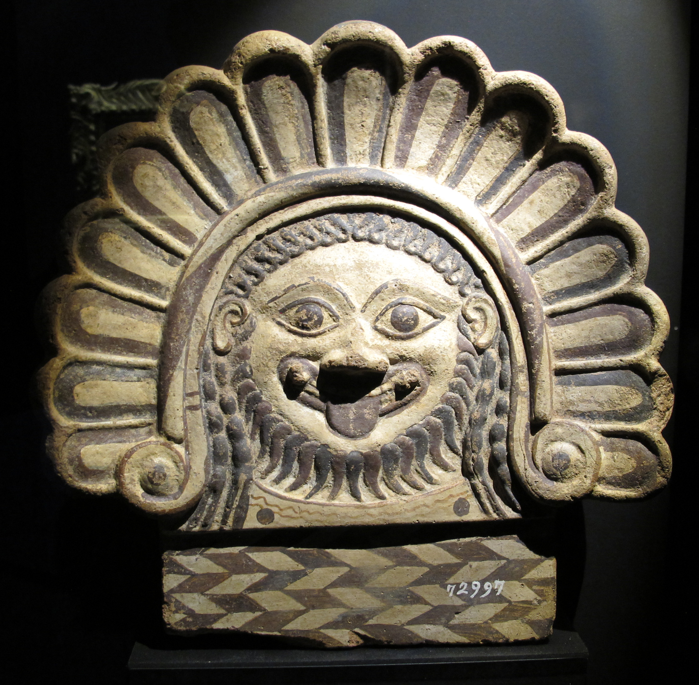 Monsters Exhibition (Palazzo Massimo, Rome, 2014)